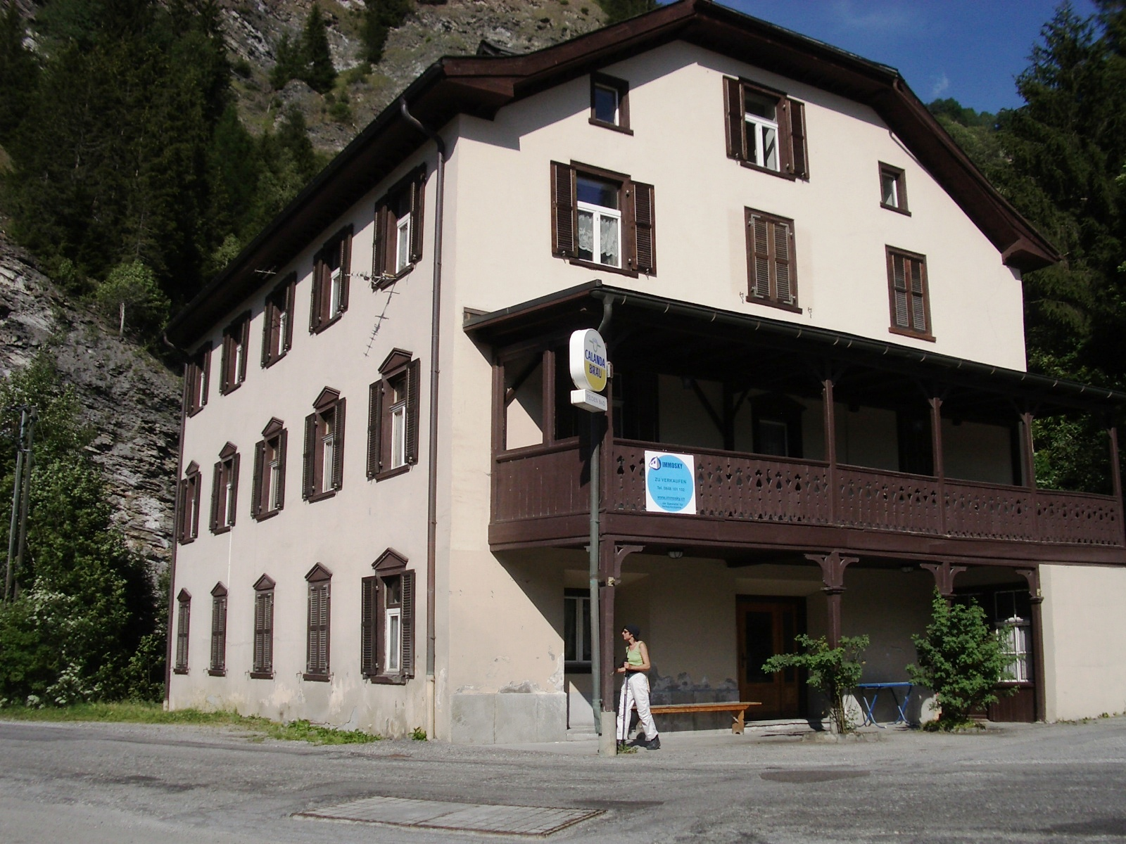 Peiden GR, Switzerland self-made, July 2006